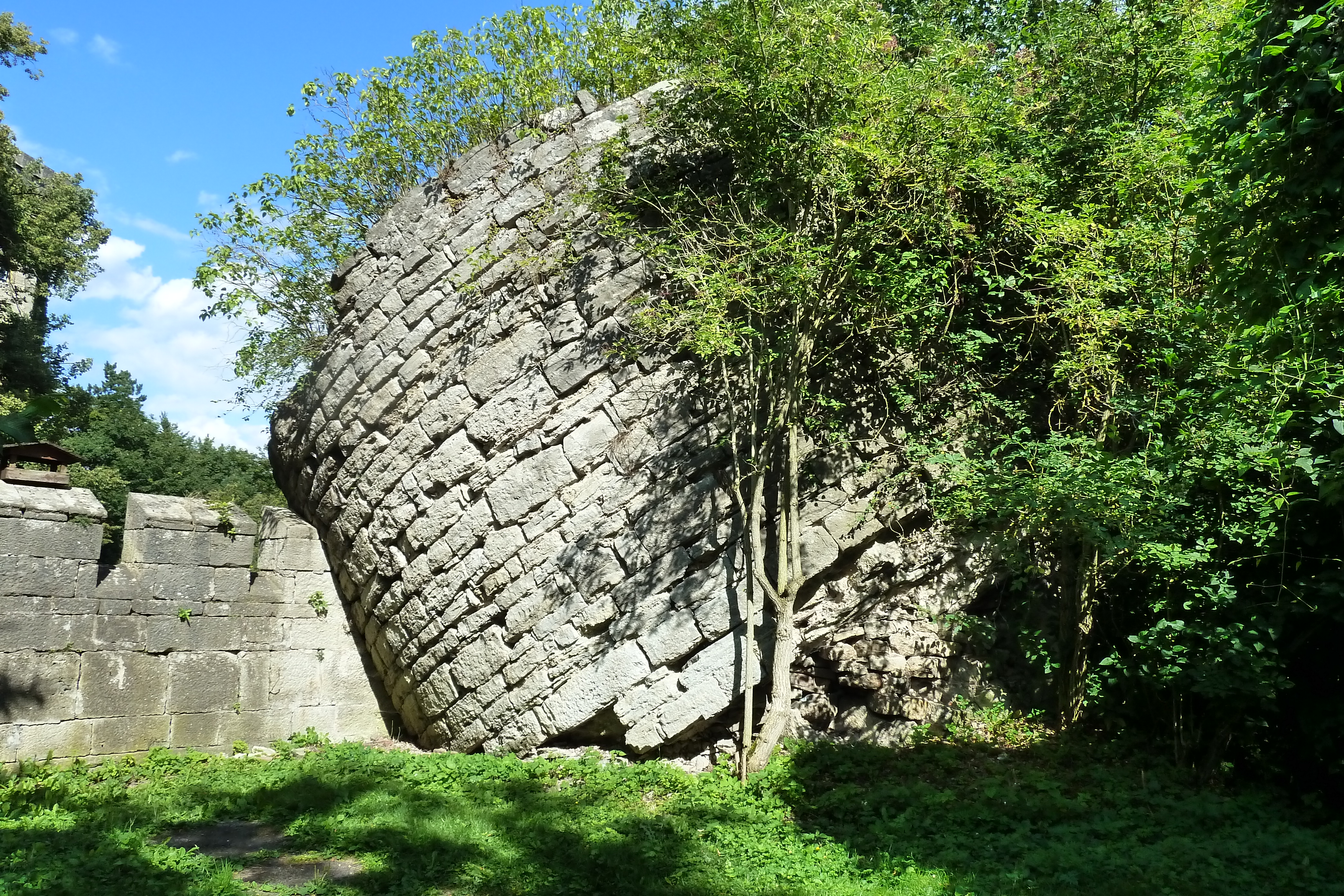 Rest vom Bergfried der Burg Landeswehre in Meiningen, heute integriert in das Schloss Landsberg.